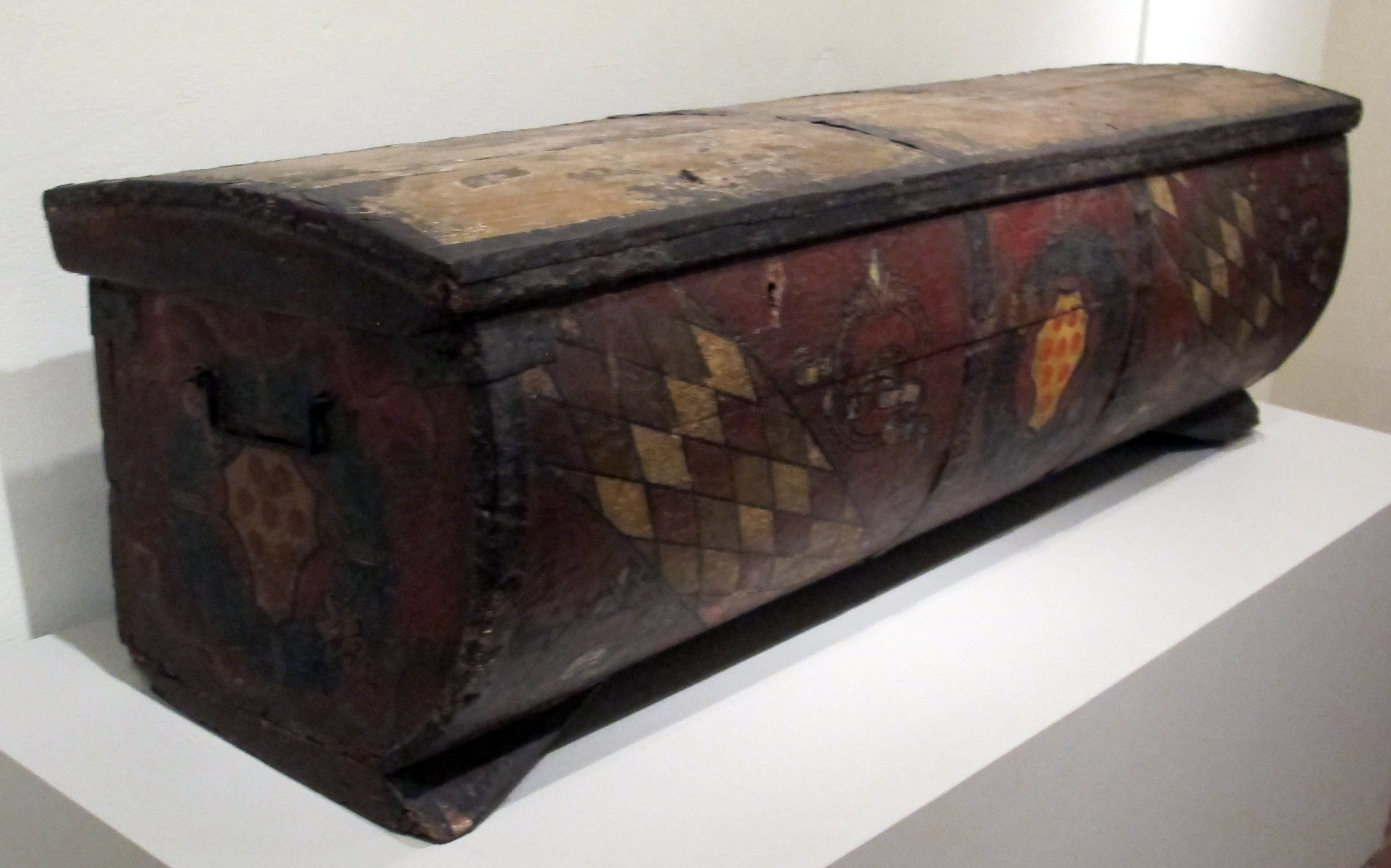 Philadelphia Museum of Art